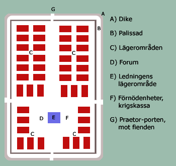 Skiss över en legions lägerförläggning i fält